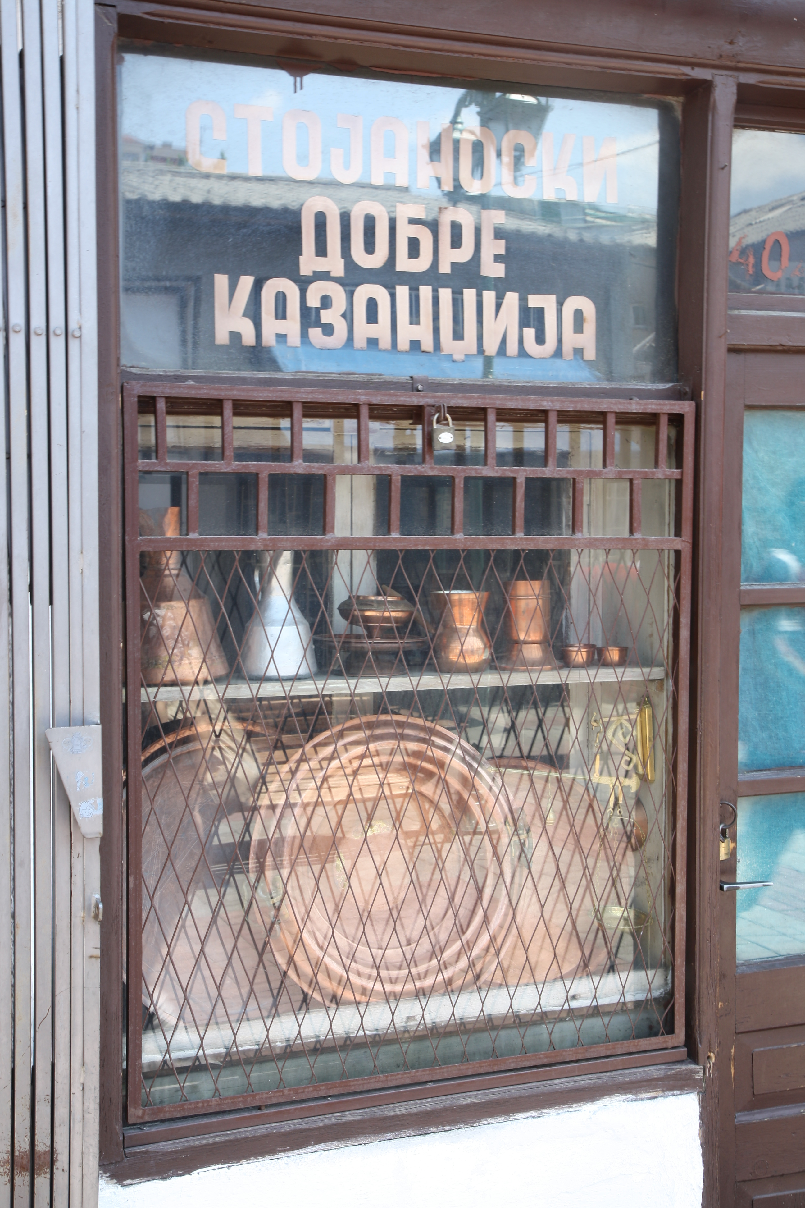 Казанџија, ул. Херој Карпош